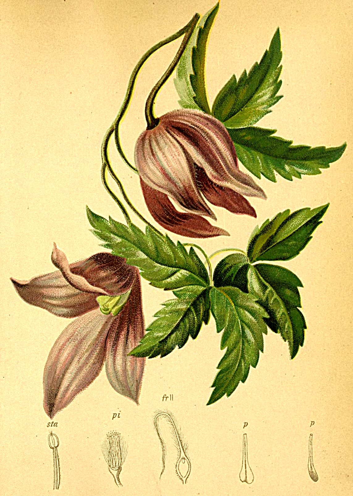 Clematis alpina (Atragenes alpina)